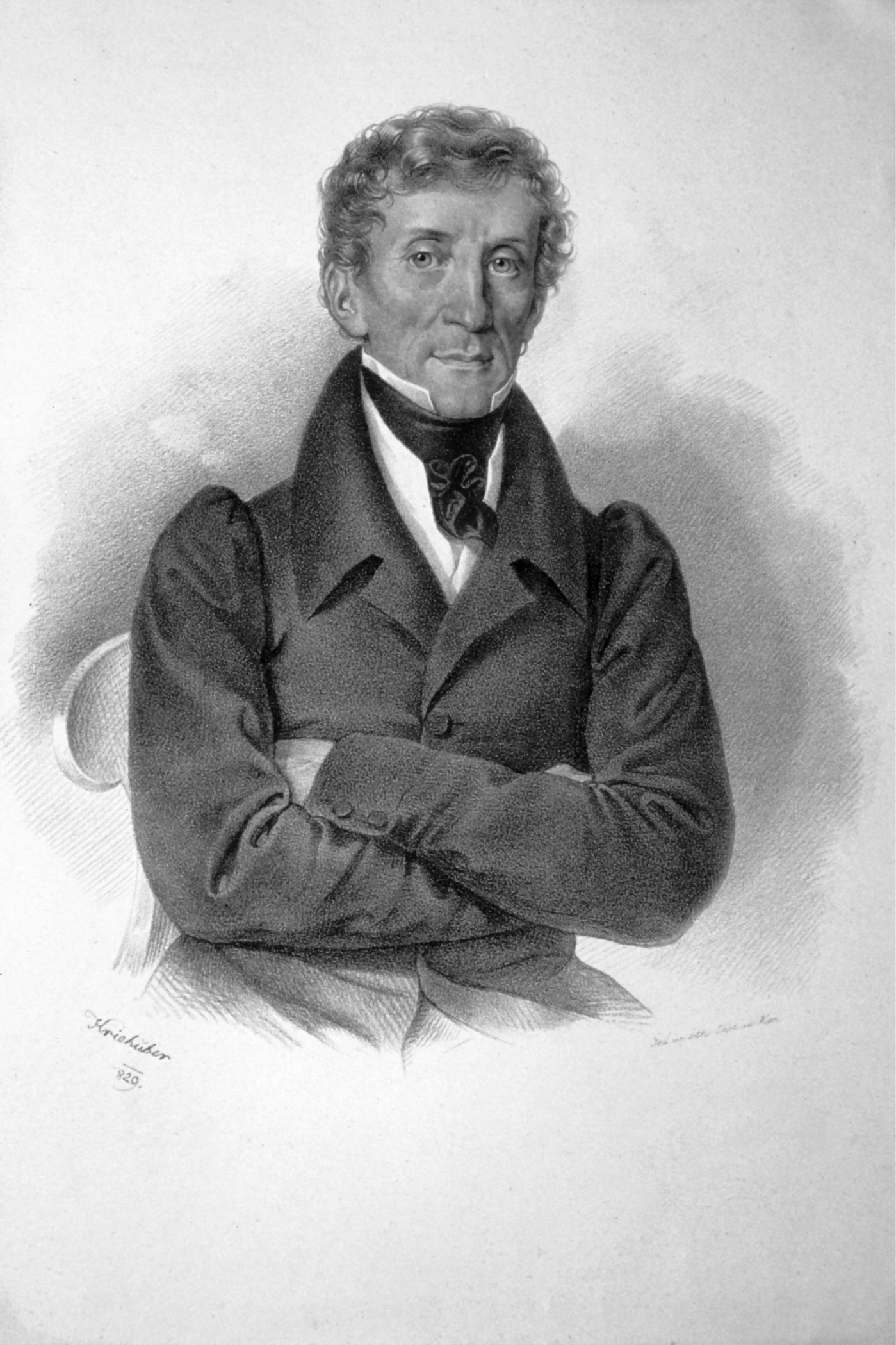 Johann Baptist Waldstätten (1772-1831), österreichischer Hofrat und Beamter Lithographie von Josef Kriehuber, 1829